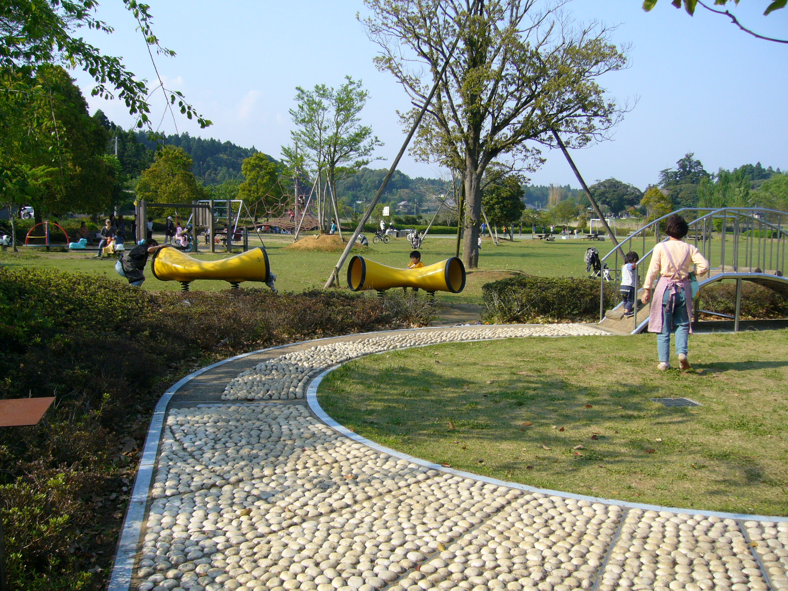 kurimoto-hureainosato-park1,katori-city,japan